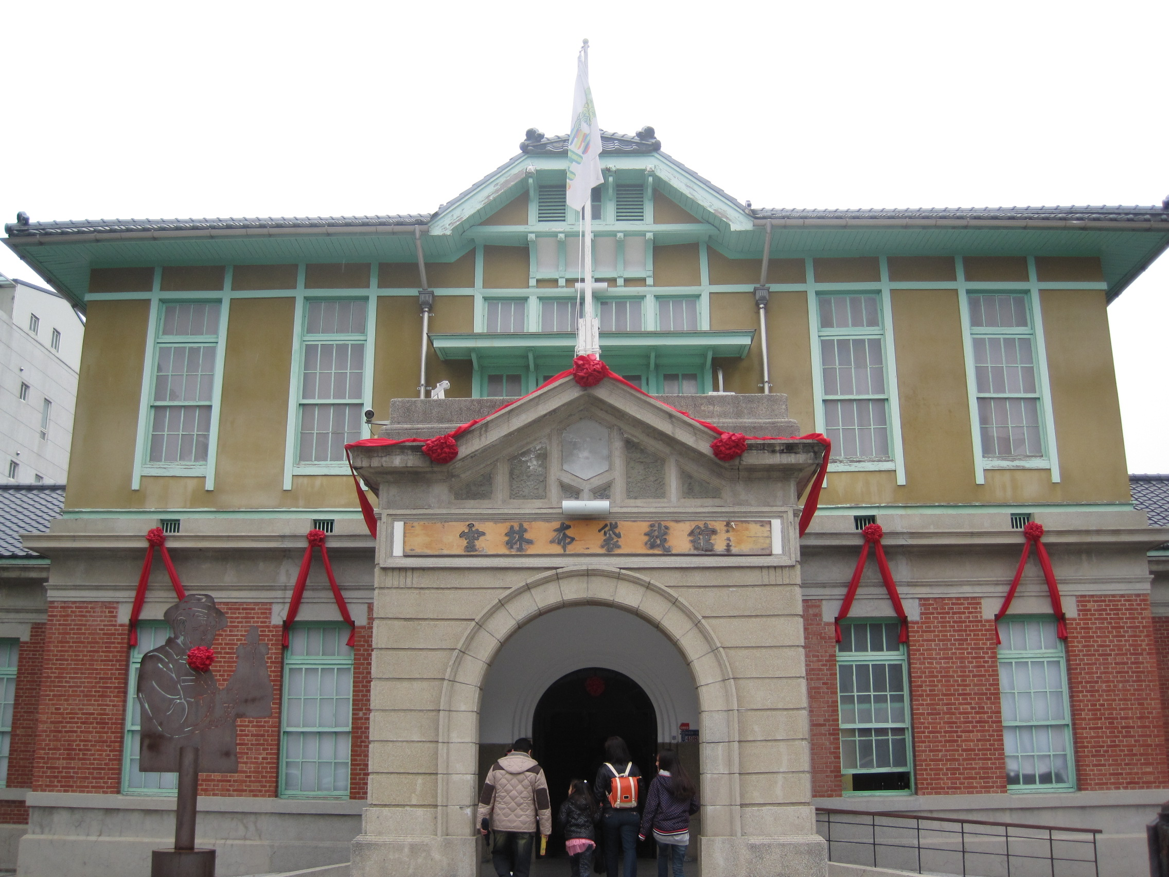 日治時期是為虎尾郡役所，現今則用為雲林縣布袋戲館。